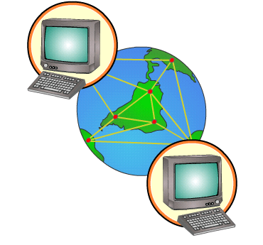 demografia en internet (ilustracion)